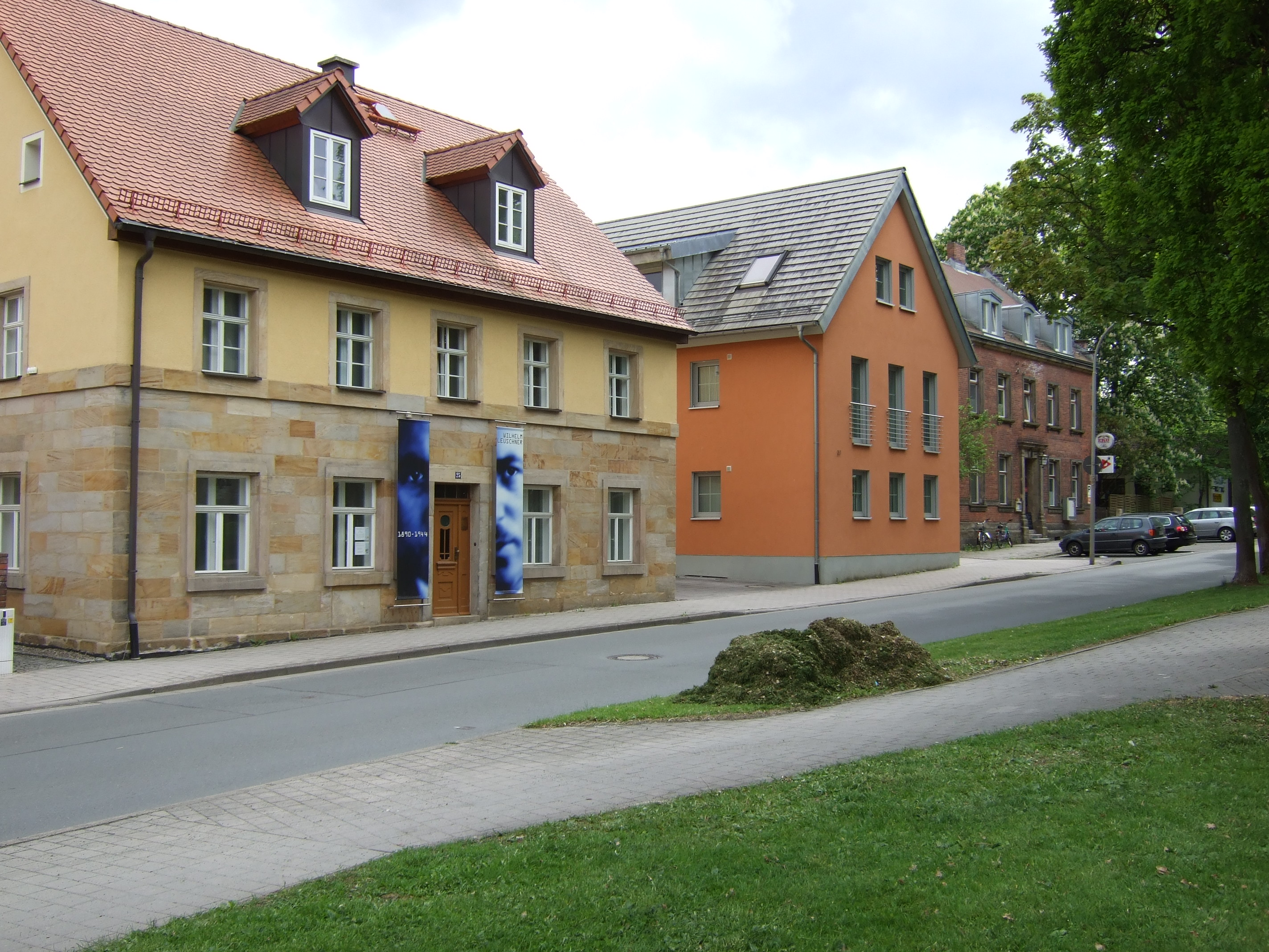 Bayreuth Moritzhöfen Leuschnerhaus